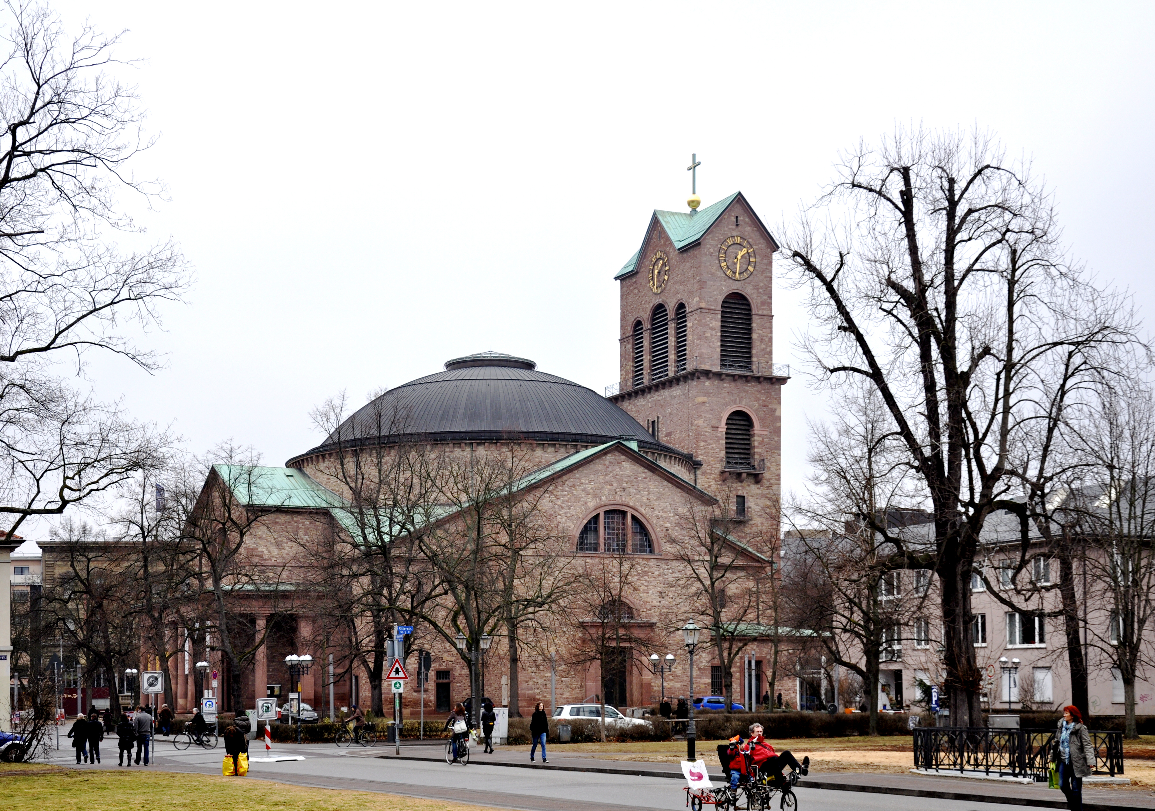 Karlsruhe, Katholische Pfarrkirche St. Stephan